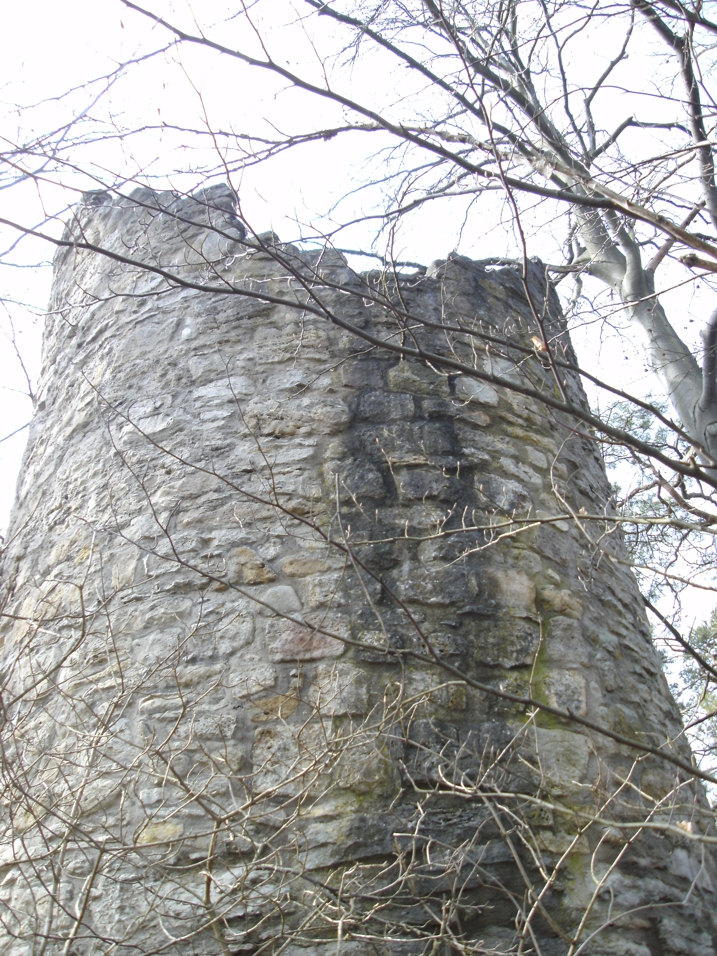 Der Einschnitt im Mauerwerk der Stockheimer Warte